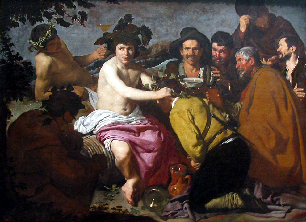 La obra, titulada El triunfo de Baco o Los Borrachos, es una de las obras mitológicas más conocidas del pintor sevillano Diego Velázquez.